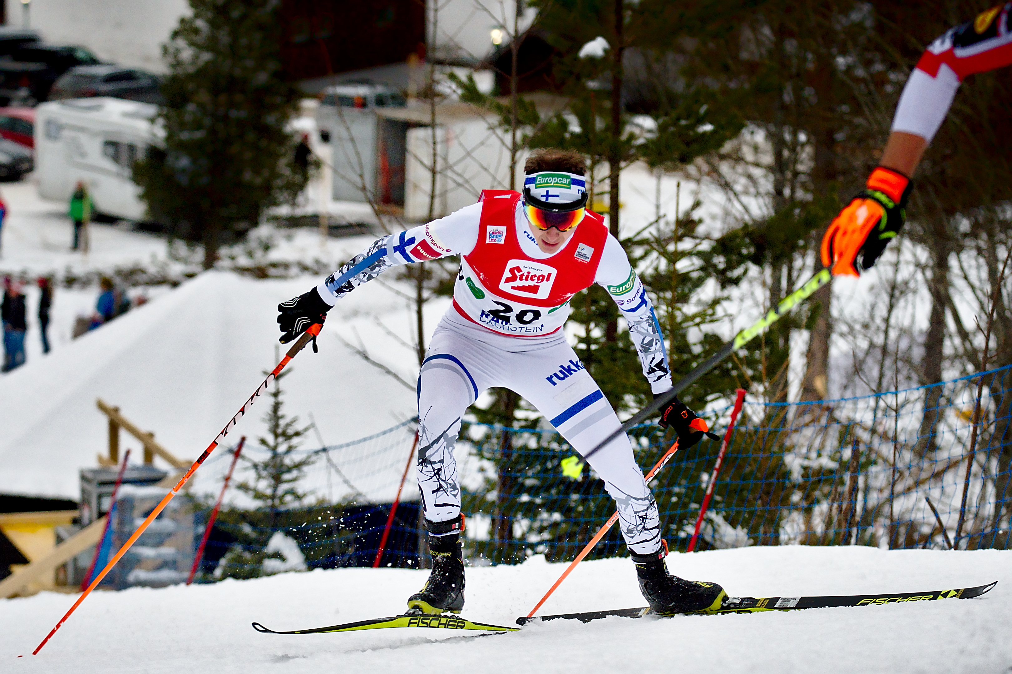 FIS Worldcup Nordic Combined Ramsau 2016. Bild zeigt Ilkka Herola (FIN)